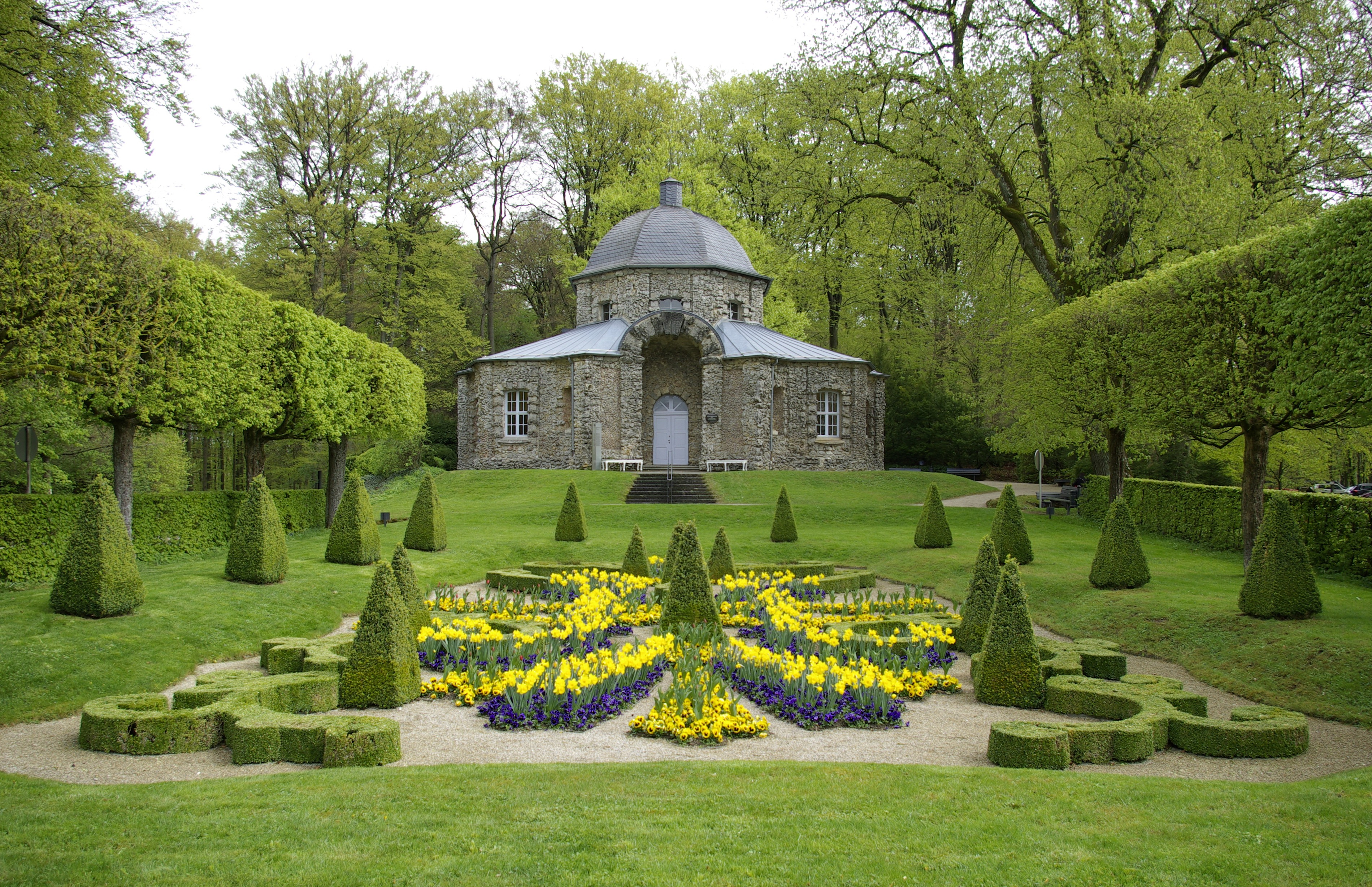 Der Morgenländische Bau im Felsengarten Sanspareil